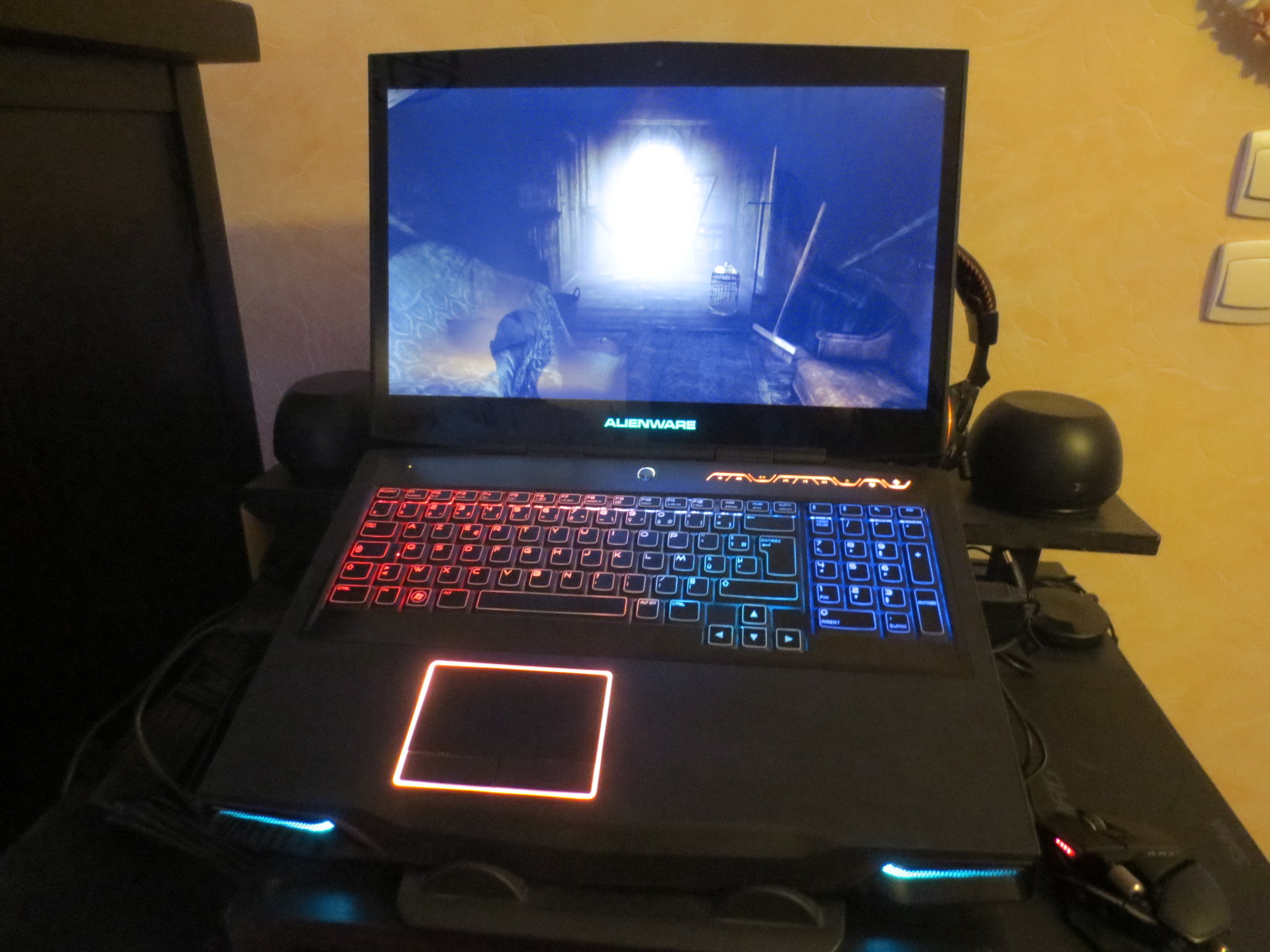 Alienware